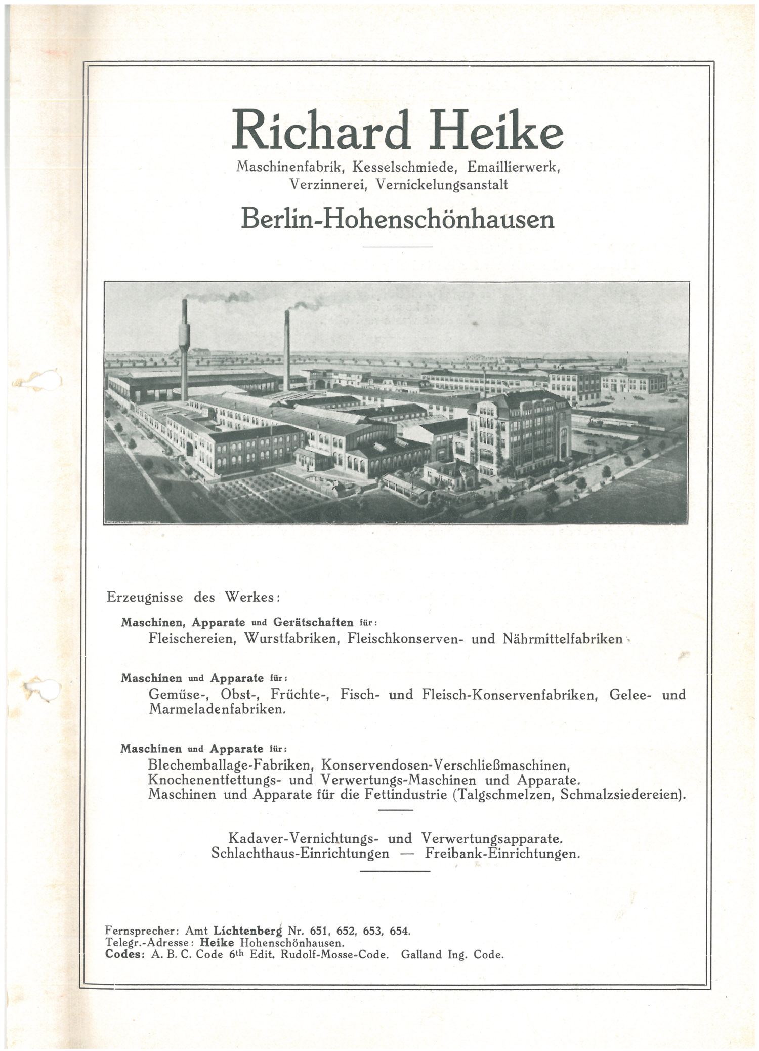 Katalog Maschinenfabrik Richard Heike, erste Seite